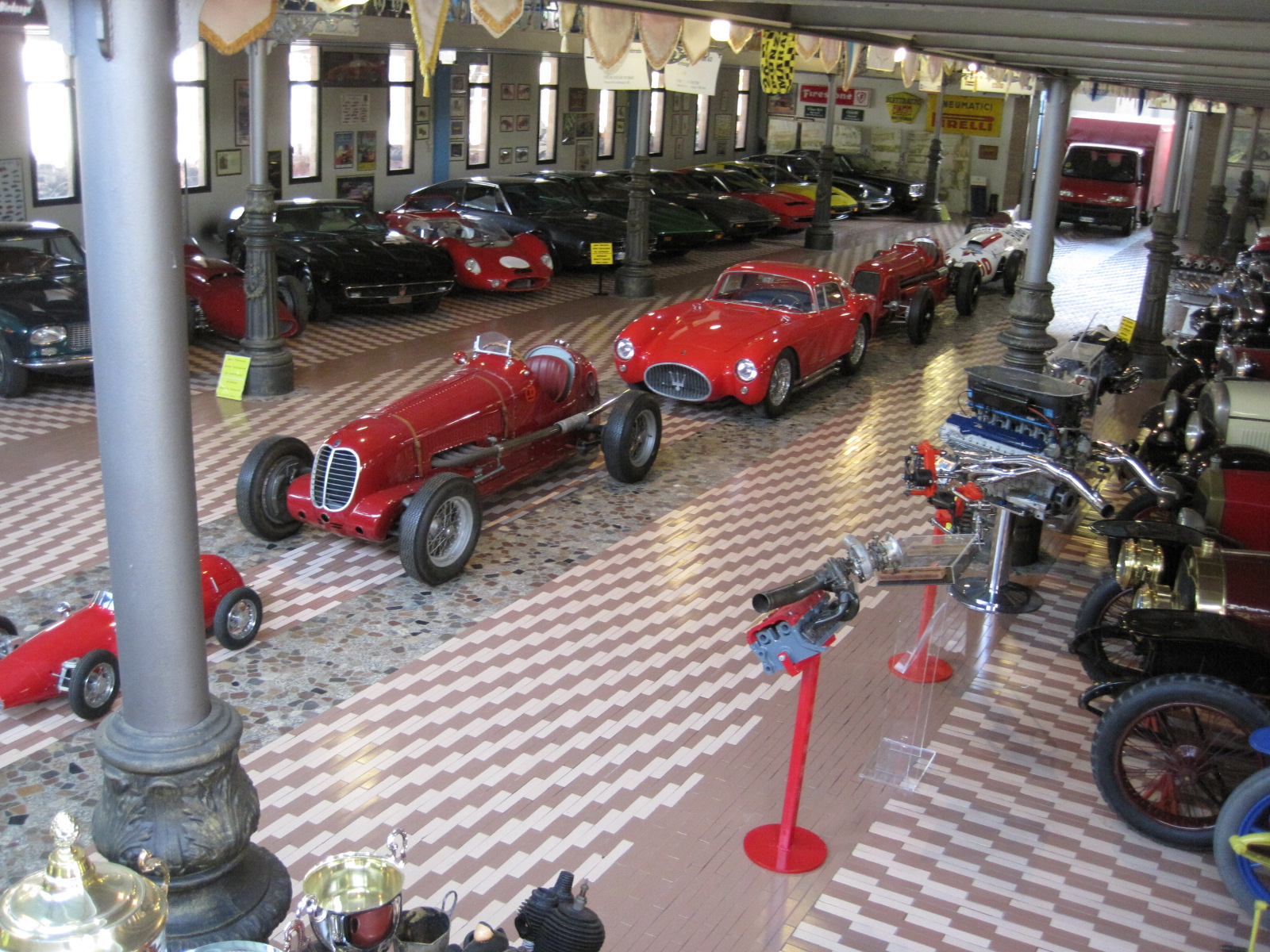 Automobiles in Panini Maserati Museum in Modène